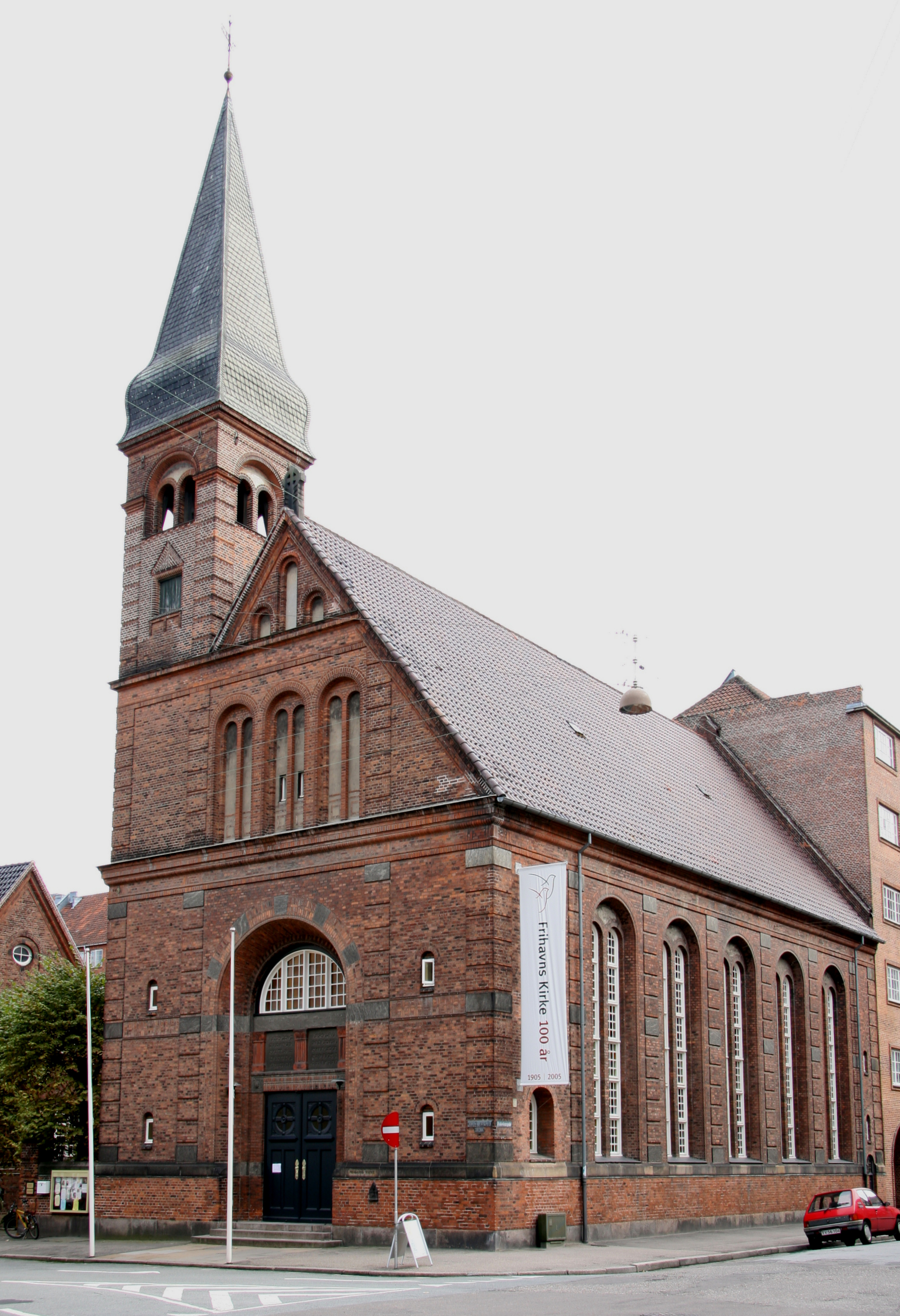 Frihavnskirken in Copenhagen, Denmark.